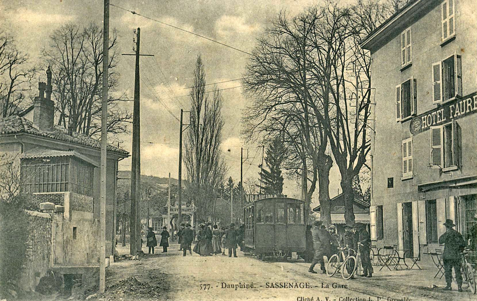 Carte postale ancienne éditée par Collection L. P. à Grenoble, cliché A. V. , collection Dauphiné, n°577 : SASSENAGE - La Gare